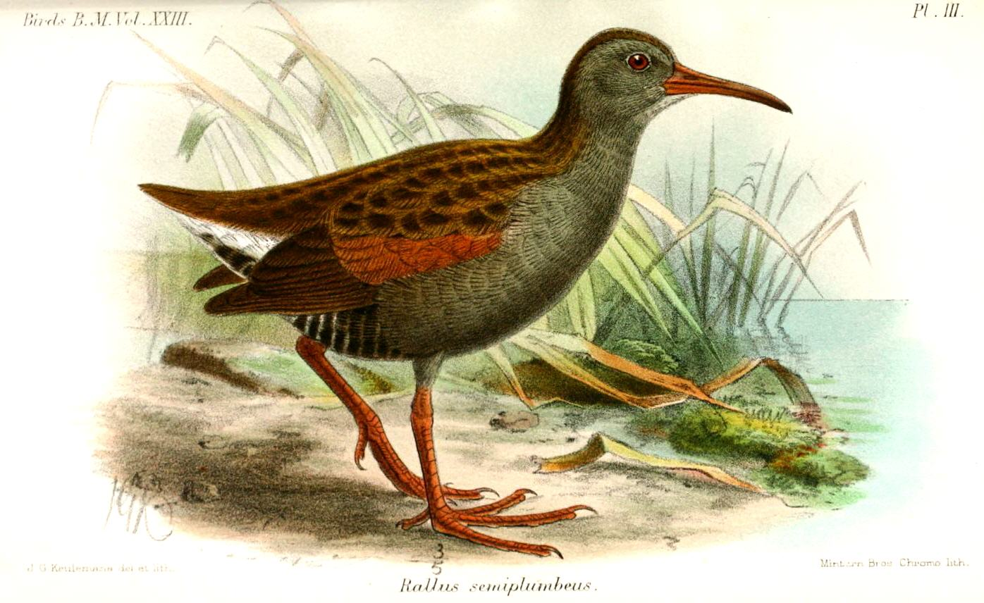 Rallus semiplumbeus, Bogotá Rail